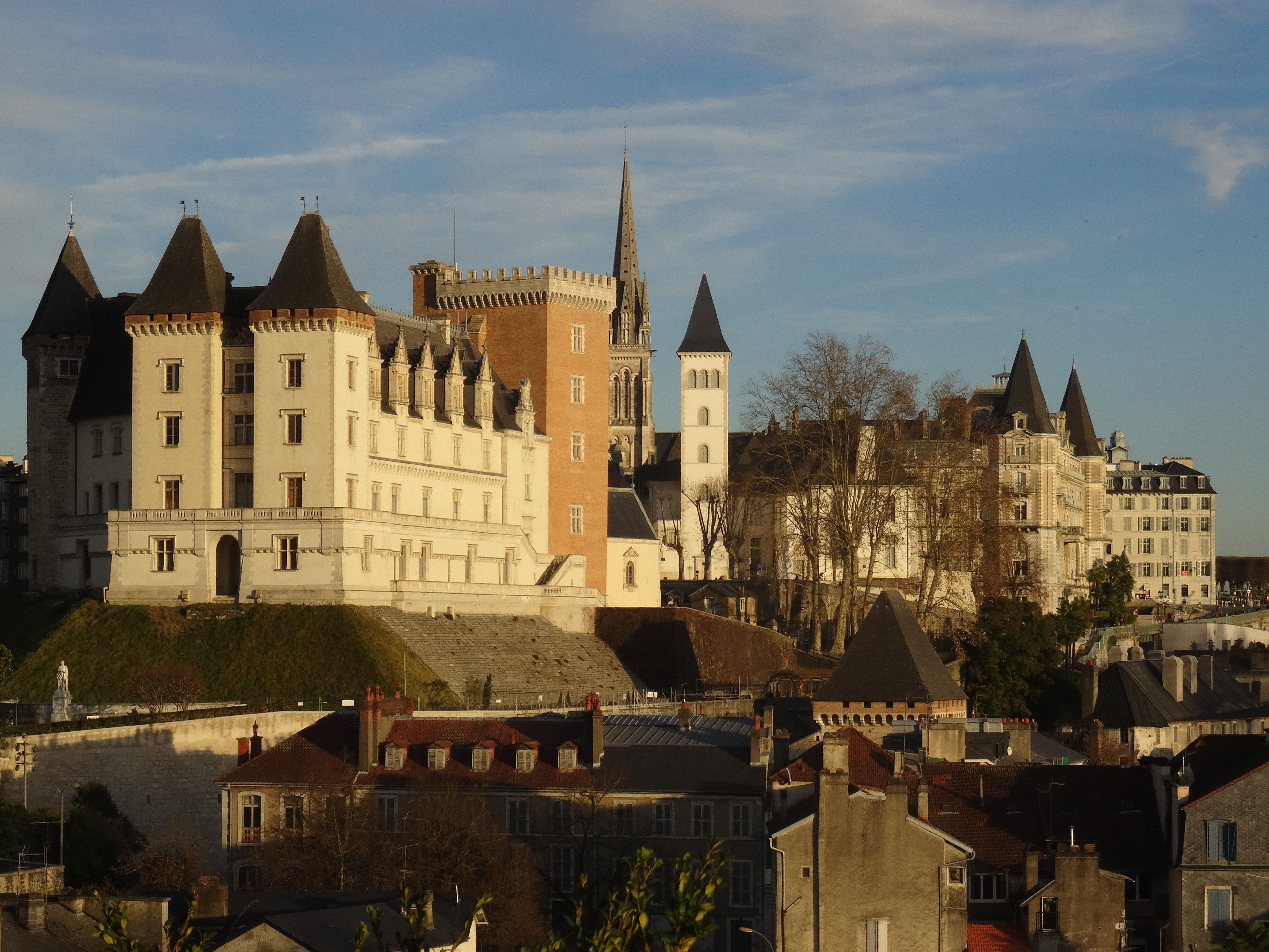 Vue sur Pau, avec le château de Pau, le clocher de l'église Saint-Martin, la tour du Parlement et le Gassion